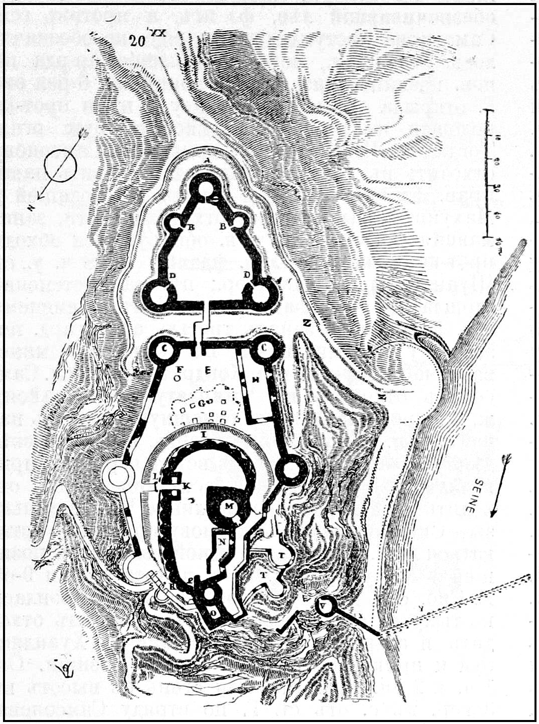 Данное фото было использовано в статье «Гайяр» опубликованной в седьмом томе «Военной энциклопедии», который был издан книгоиздательским товариществом И. Д. Сытина в 1912 году в столице Российской империи городе Санкт-Петербурге.